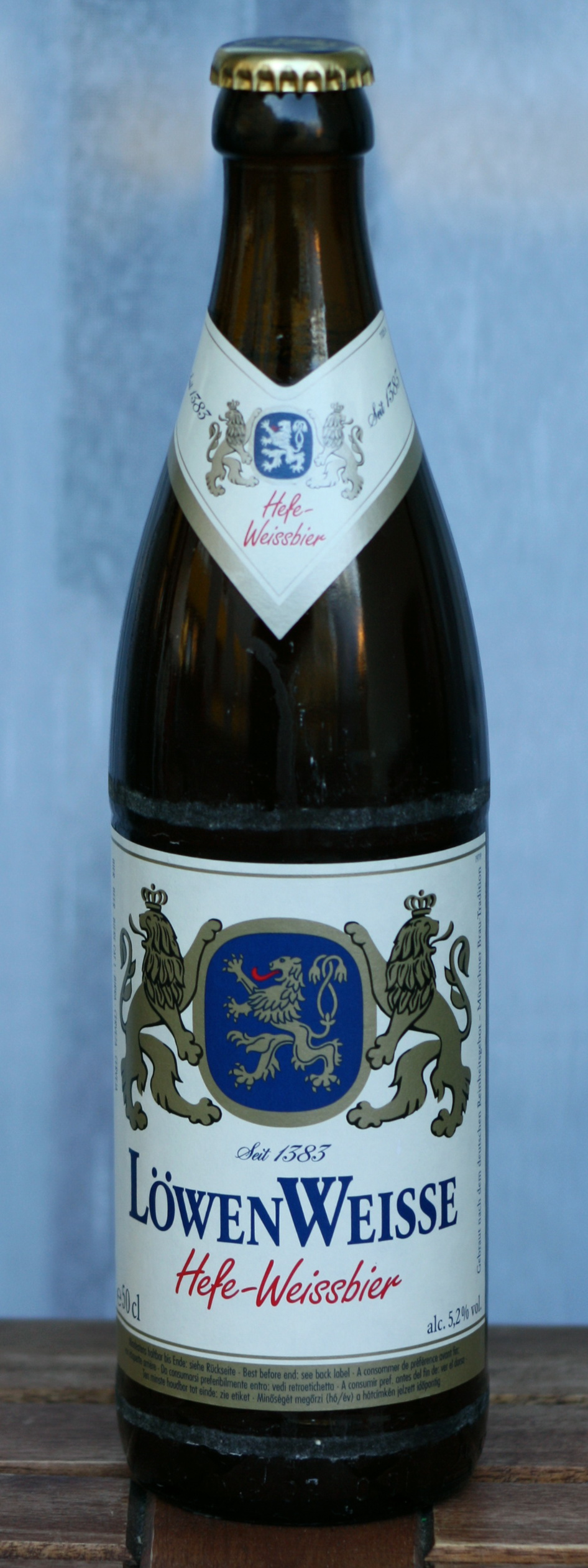 Bierflasche - Löwenbräu Brauerei AG - Weißbier, Alc. 5,2 % vol